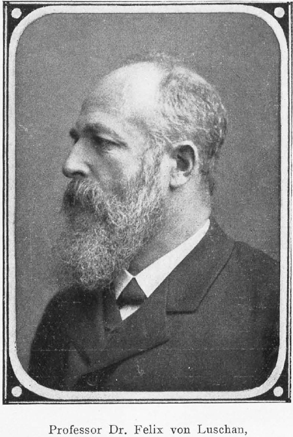 Felix Ritter von Luschan (1854-1924),Arzt, Anthropologe, Forschungsreisender, Archäologe und Ethnograph sowie Direktor der afrikanisch-ozeanischen Sammlung des Museums für Völkerkunde in Berlin.